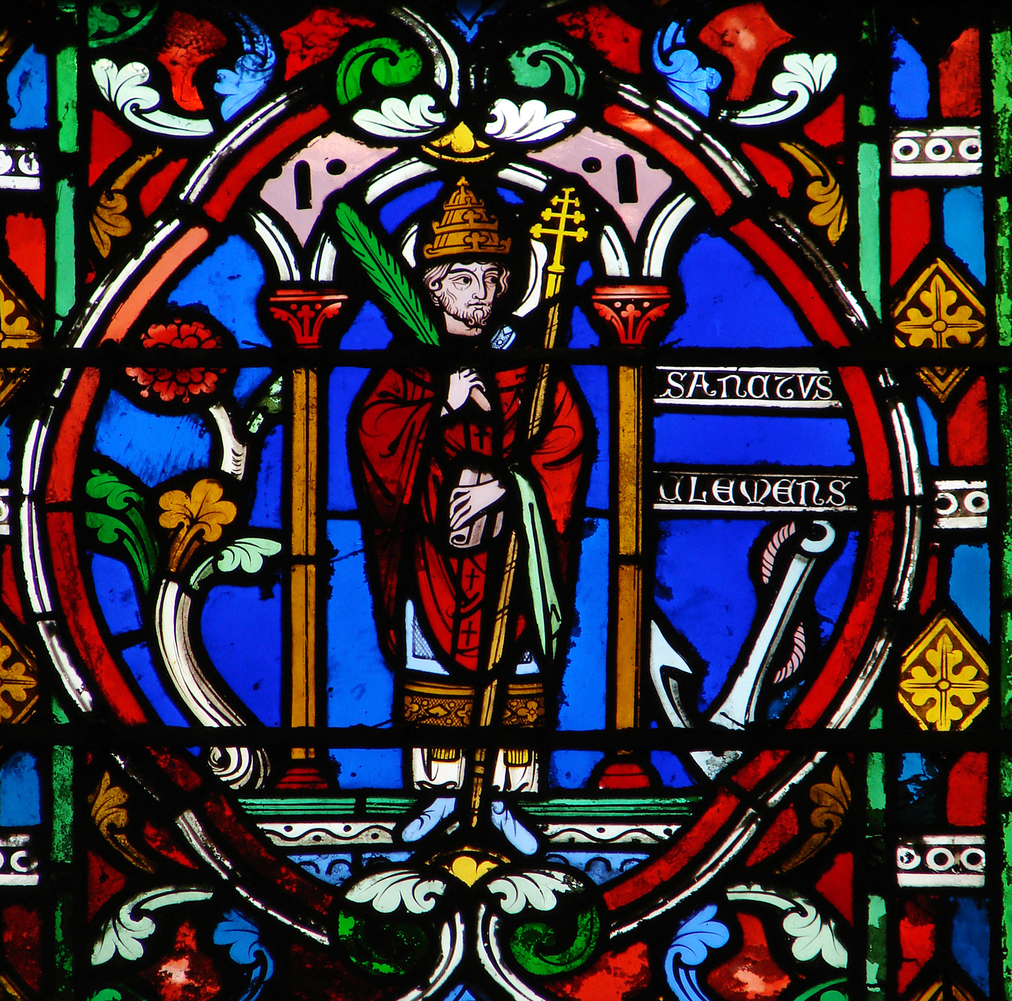 Détail d'un vitrail néogothique de la cathédrale de Meaux, daté de 1869: Saint Clément de Rome (identifiable à l'ancre de son martyre).